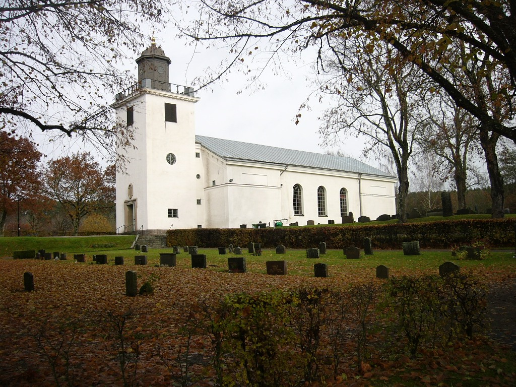 Yxnerums kyrka